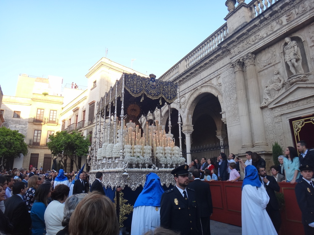 Antiguo Cabildo de Jerez, Jerez de la Frontera (Andalucía, España)